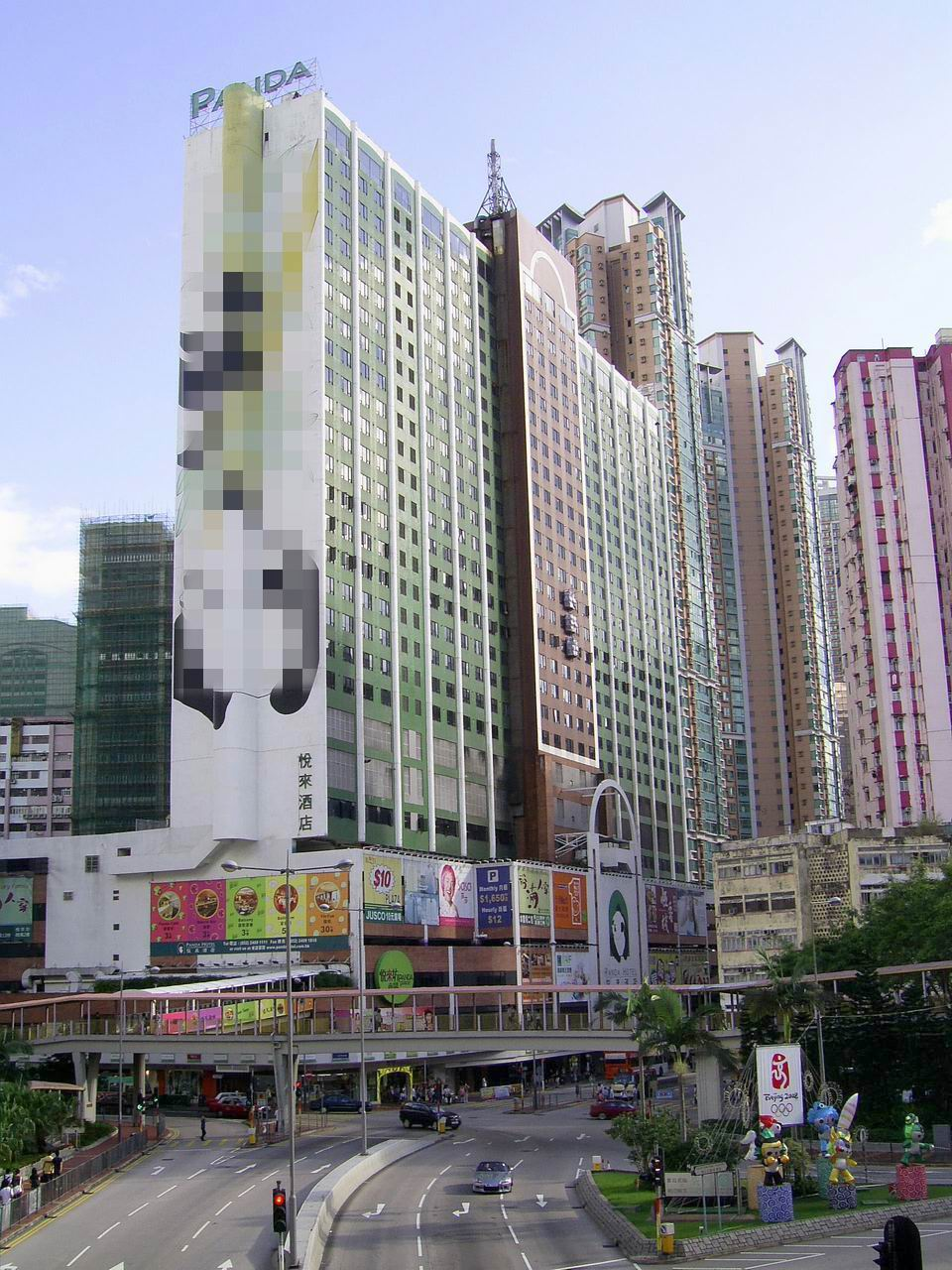 中文（香港）: 悅來酒店